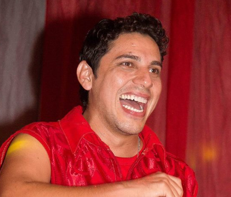 Levantador